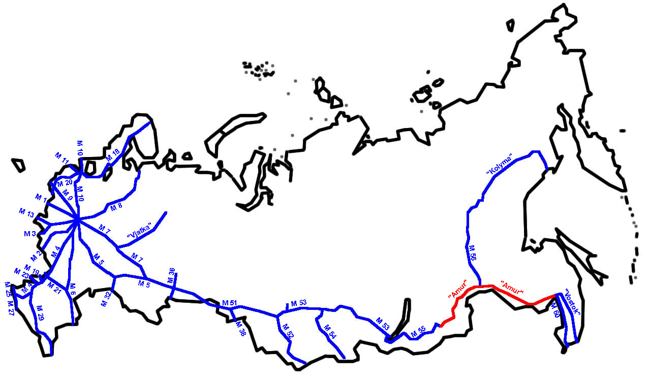 Magistrale "Amur" im russischen Fernstraßennetz